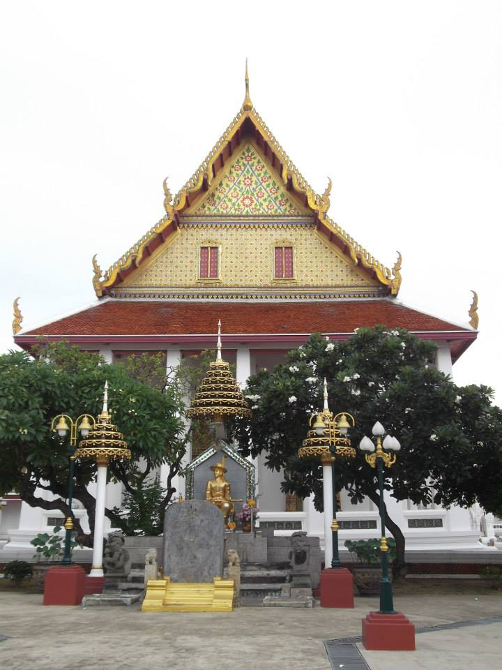 วัดอินทาราม